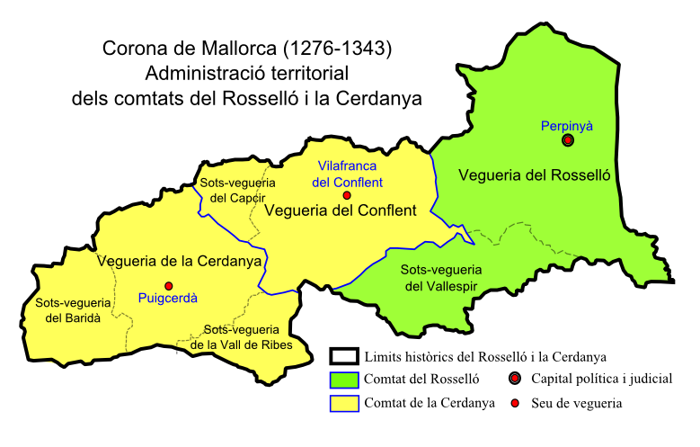 Administració del Rosselló i la Cerdanya durant la Corona de Mallorca